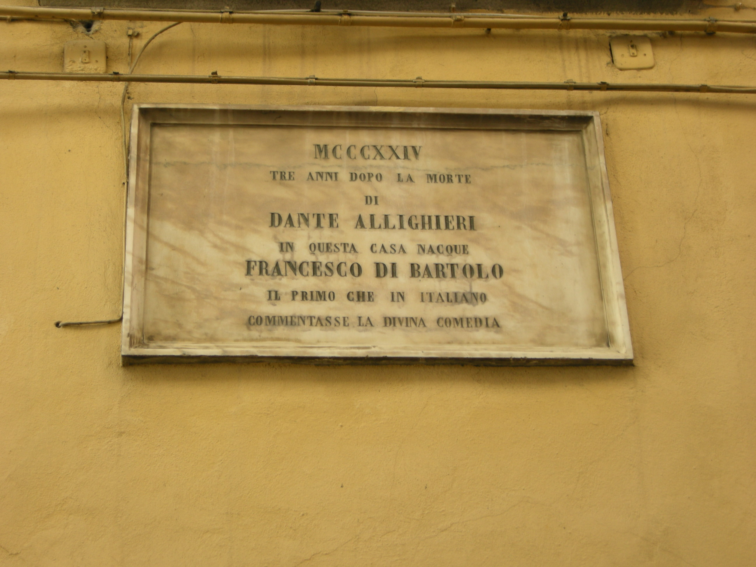 Buti, targa Francesco di Bartolo.